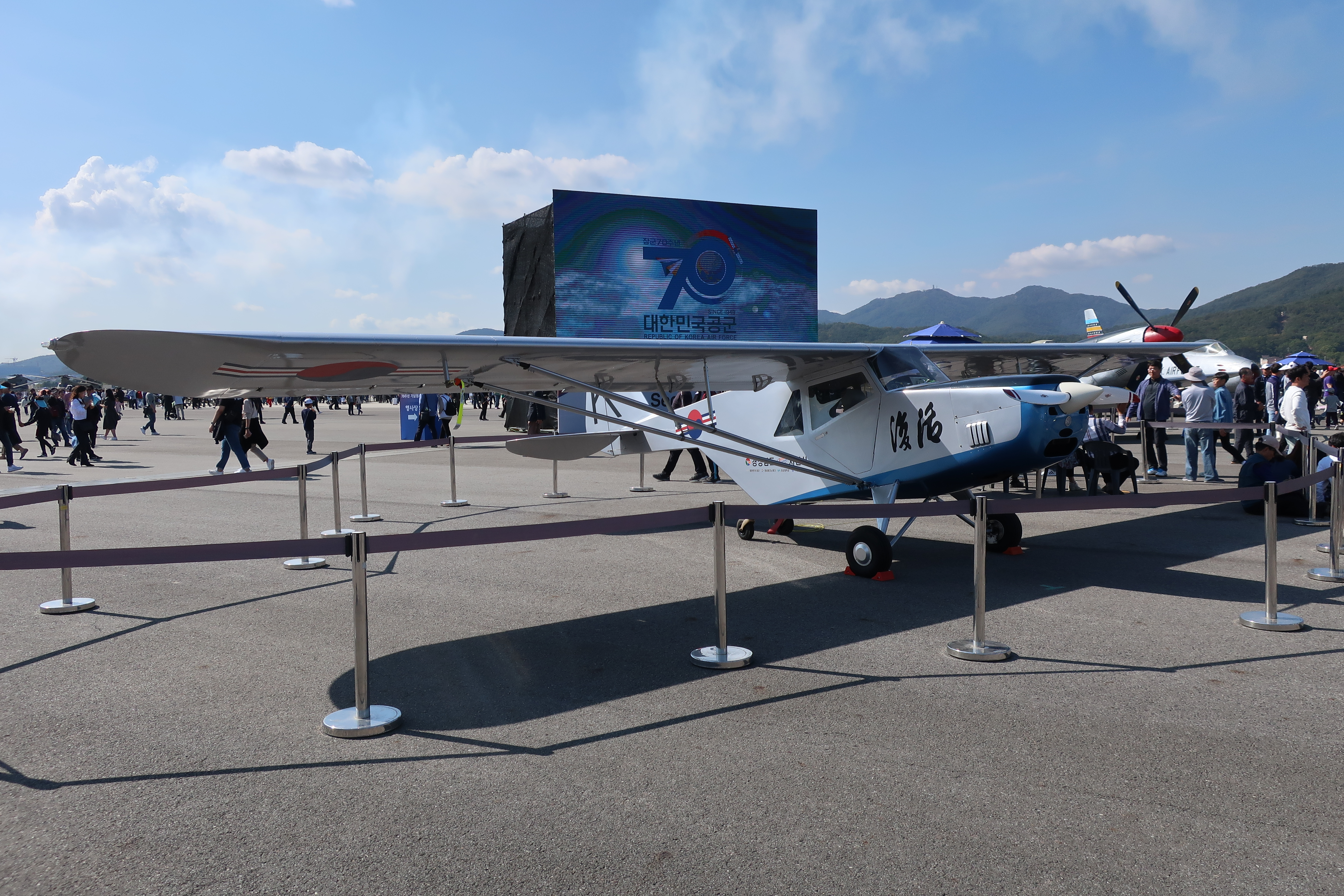 ADEX 2019에 전시된 부활호 개량복원기